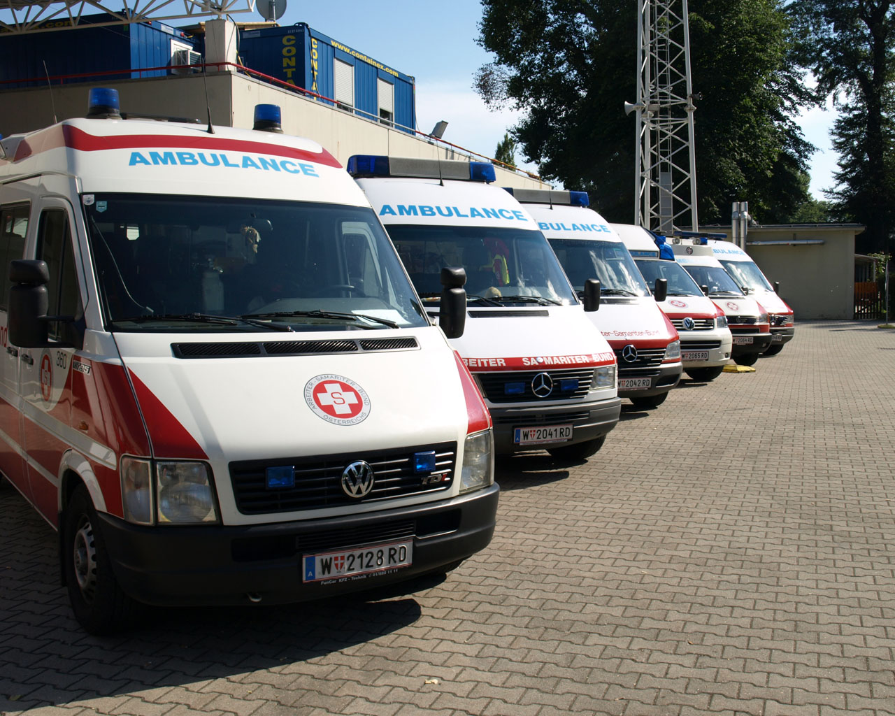 MobSan @ Stadionbad